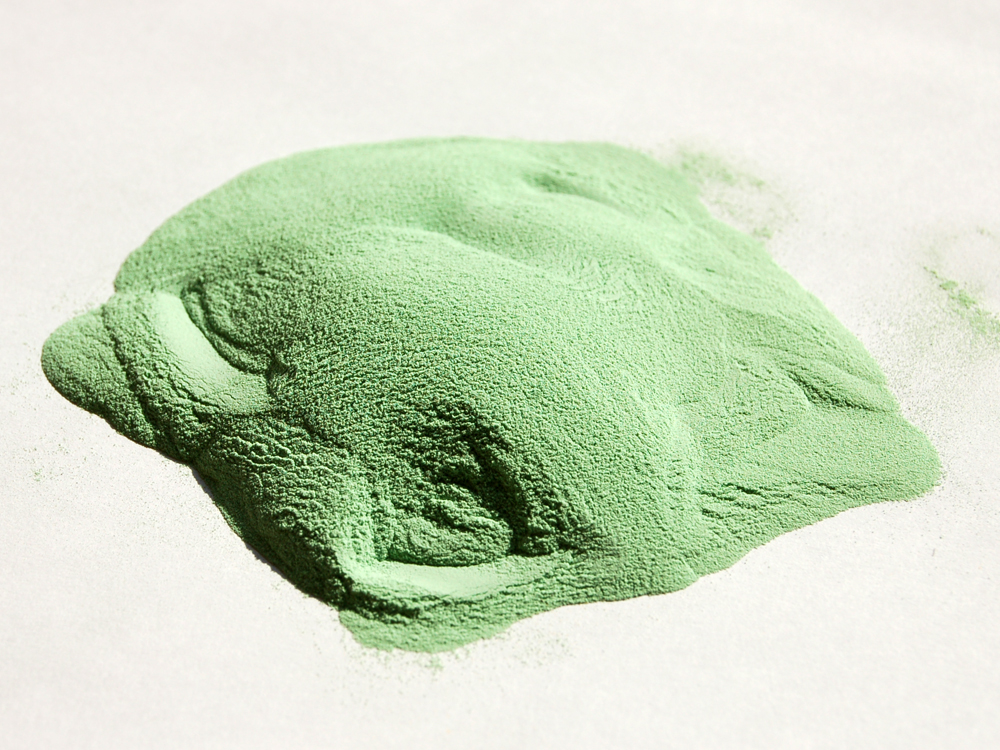 Basic nickel(II) carbonate